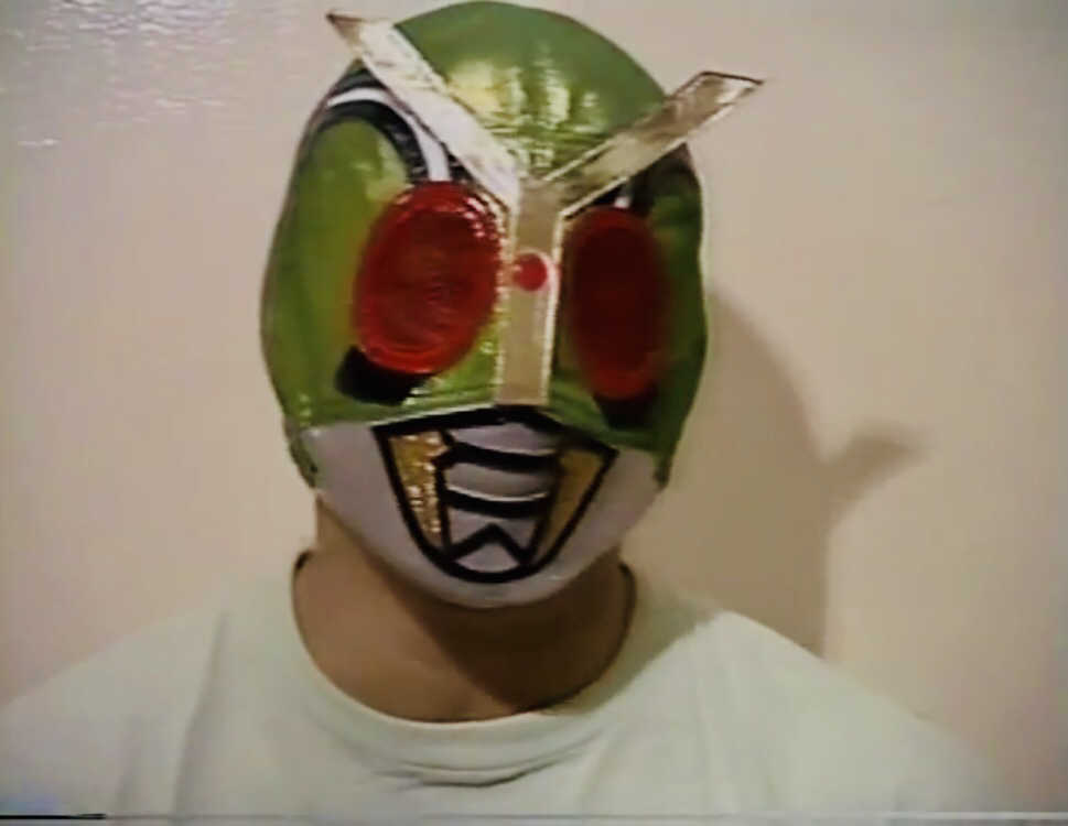 ホッパーキング近影